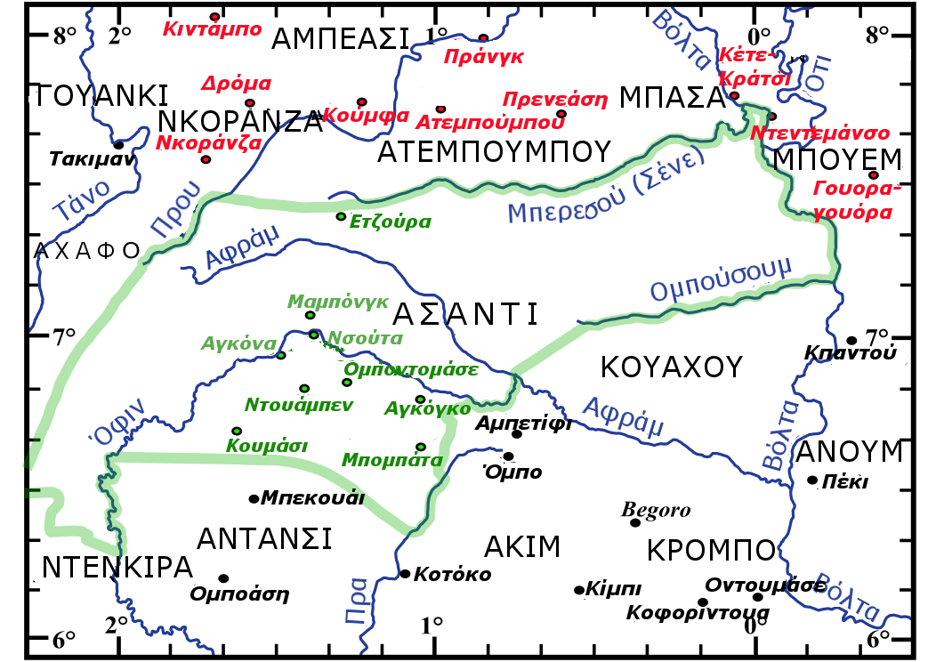 Ο πυρήνας του έθνους των Ασάντι σημειώνεται με πράσινο και οι γειτονικές περιοχές της Ομοσπονδίας σημειώνονται με κόκκινο, ~1890.